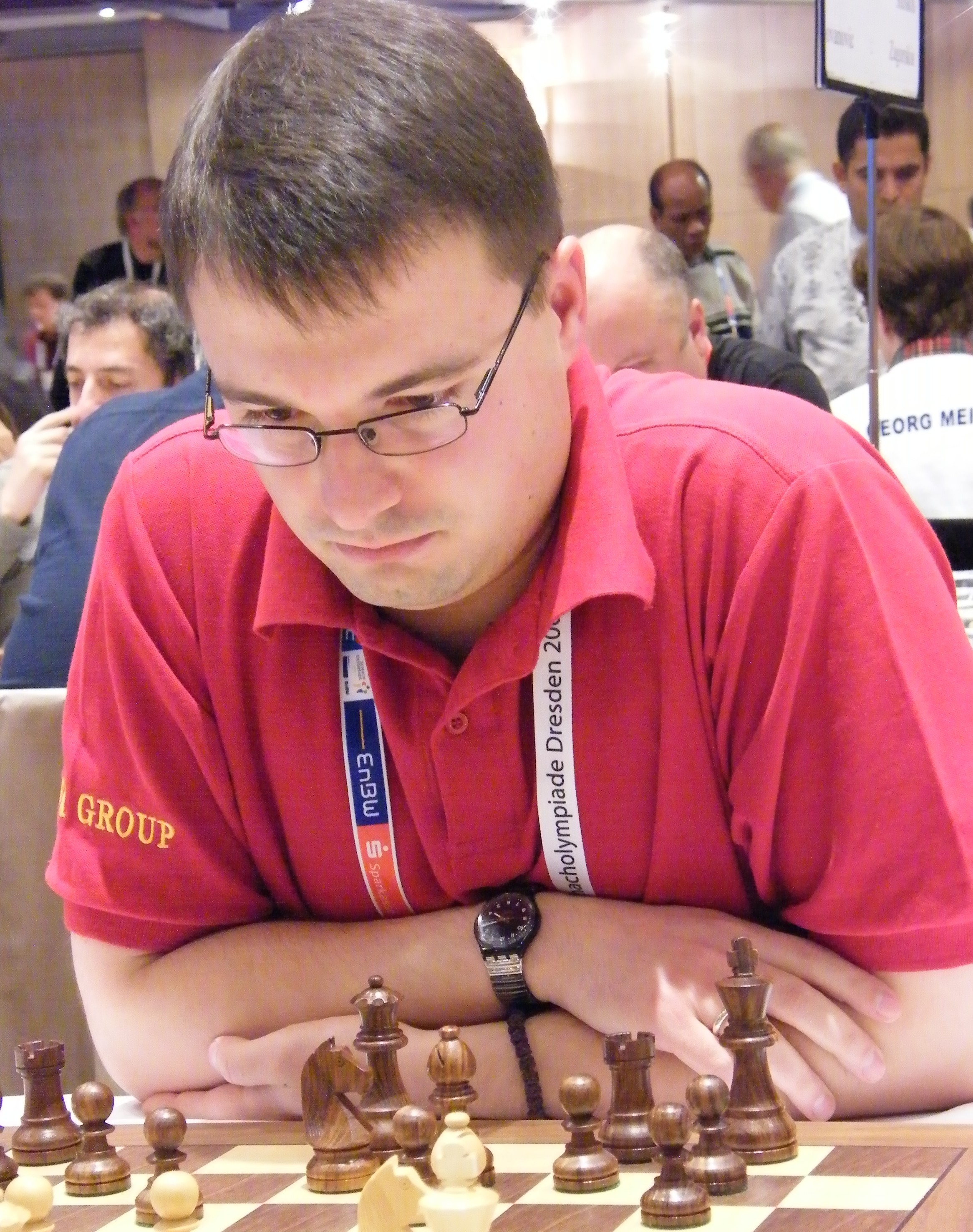 Bojan Vuckovic bei der 38. Schacholympiade in Dresden 2008